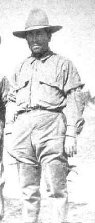 El coronel Miguel Trillo.